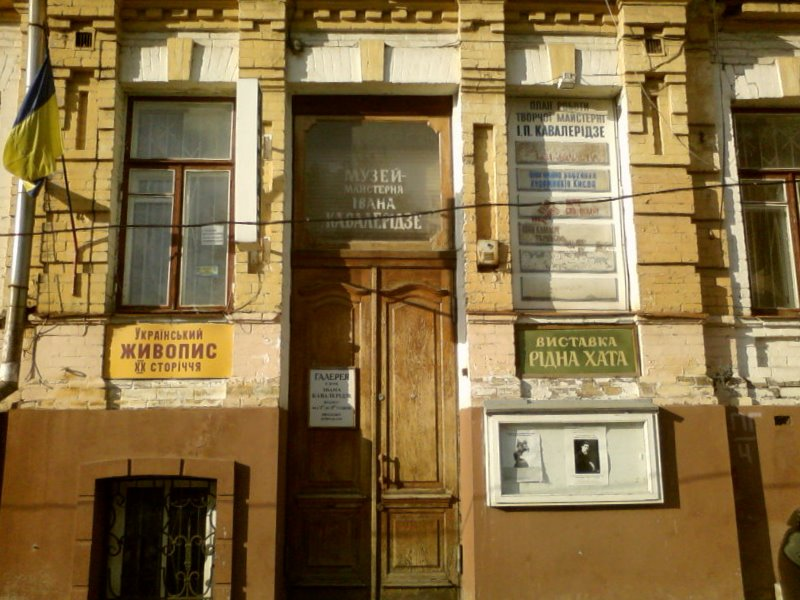 Музей-майстерня Івана Кавалерідзе